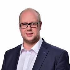 SPD Landtagsabgeordneter in Niedersachsen